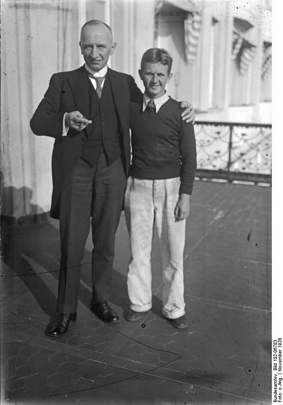 Die glückliche Landung des "Graf Zeppelin" nach seiner großen Amerikafahrt in Friedrichshafen a/Bodensee! Aufnahmen von unserm nach dort entsandten Sonder-Bild-Berichterstatter! Der blinden Passagiers, Clarence Terhune, welchem es gelang, als erster blinder Passagier den Ozean zu überfliegen, mit dem Reichsverkehrminister Guerard nach seiner Freilassung auf dem Balkon des Kurgarten-Hotels in Friedrichshafen am Bodensee.